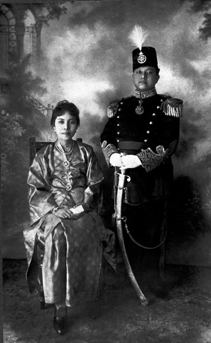 Foto. Studioportret van de Sultan van Siak met zijn echtgenote